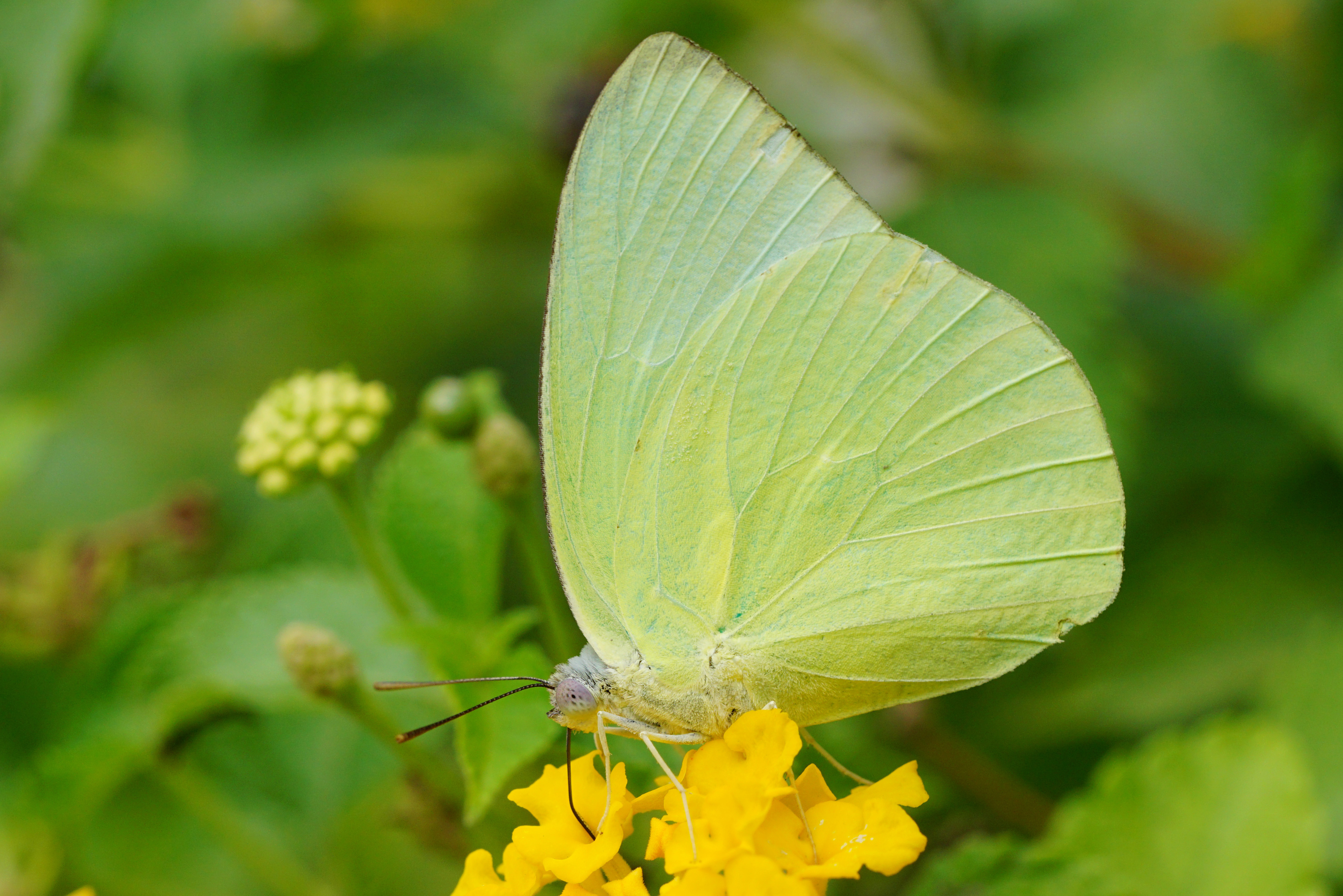 中文（台灣）: 遷粉蝶 Catopsilia pomona 無紋型